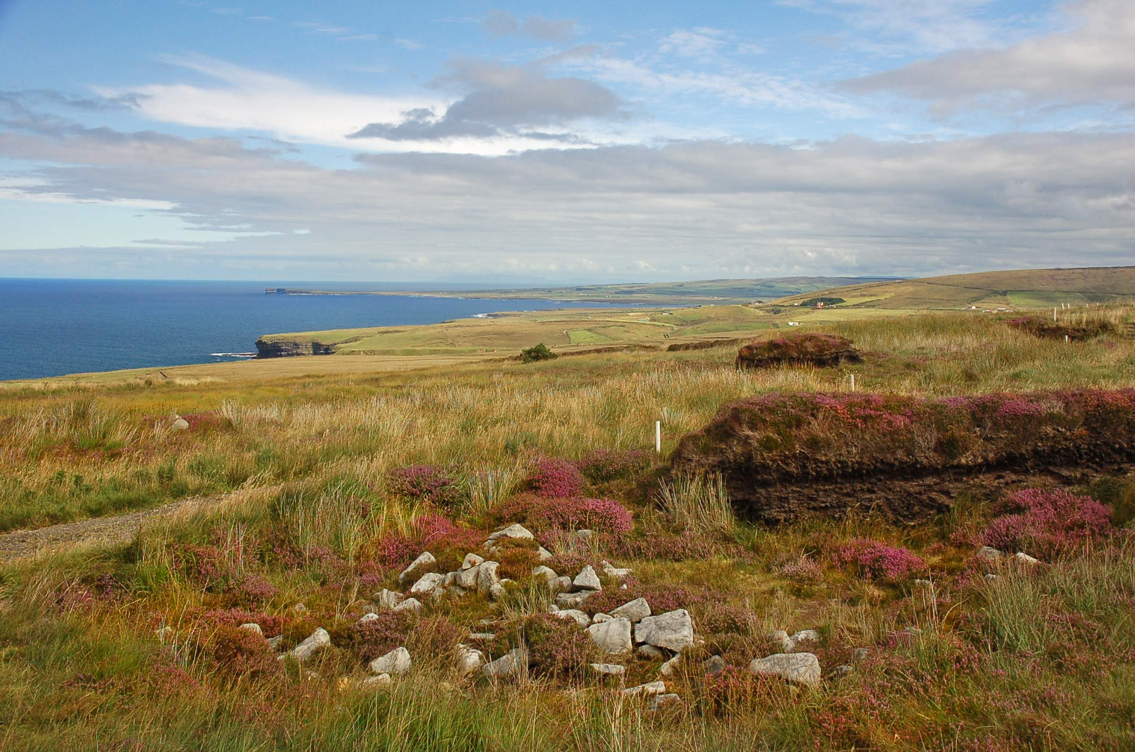 Céide-Field-Ausgrabungsstätte